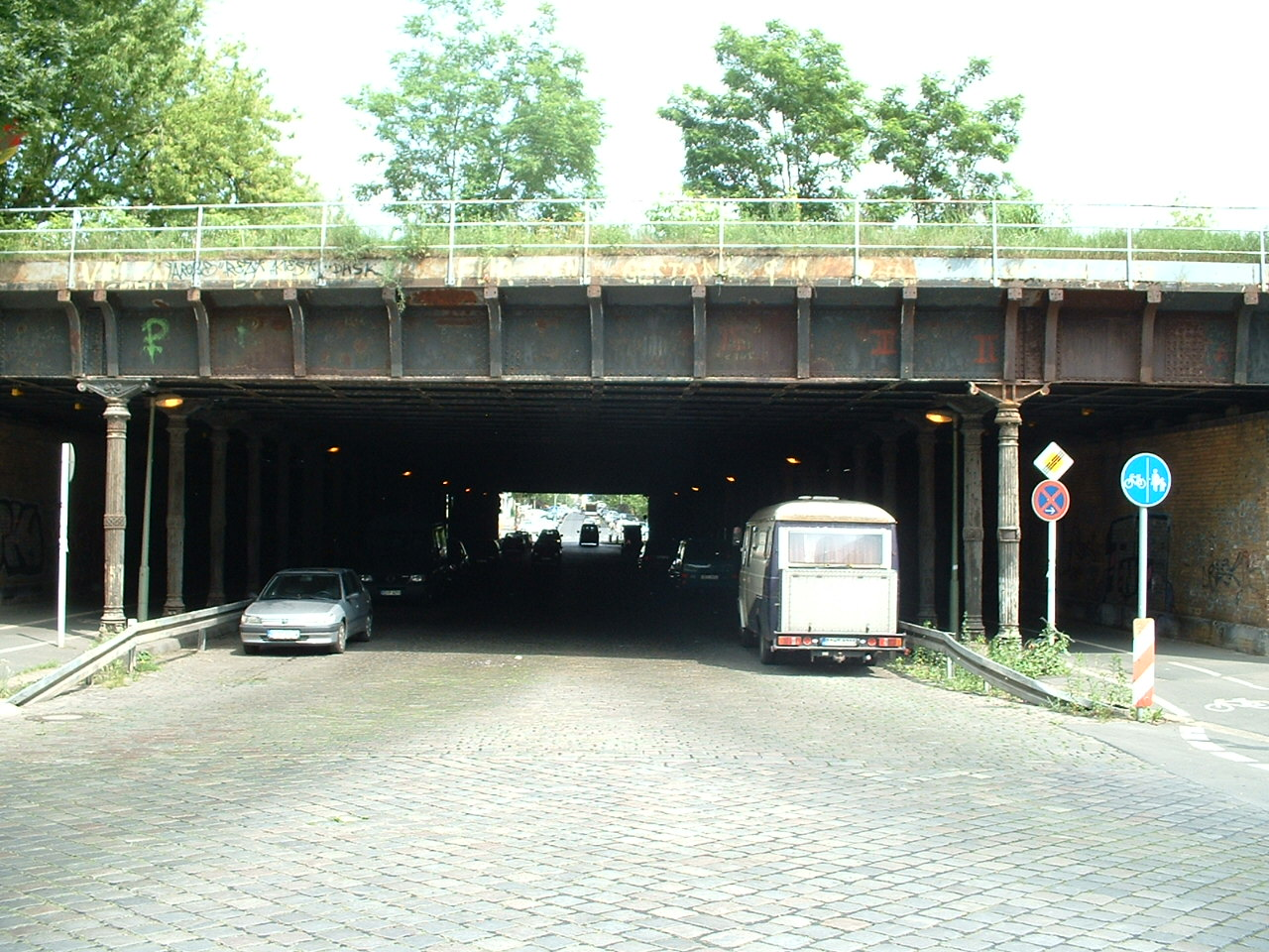 Gleimtunnel, Blick von Westen nach Osten